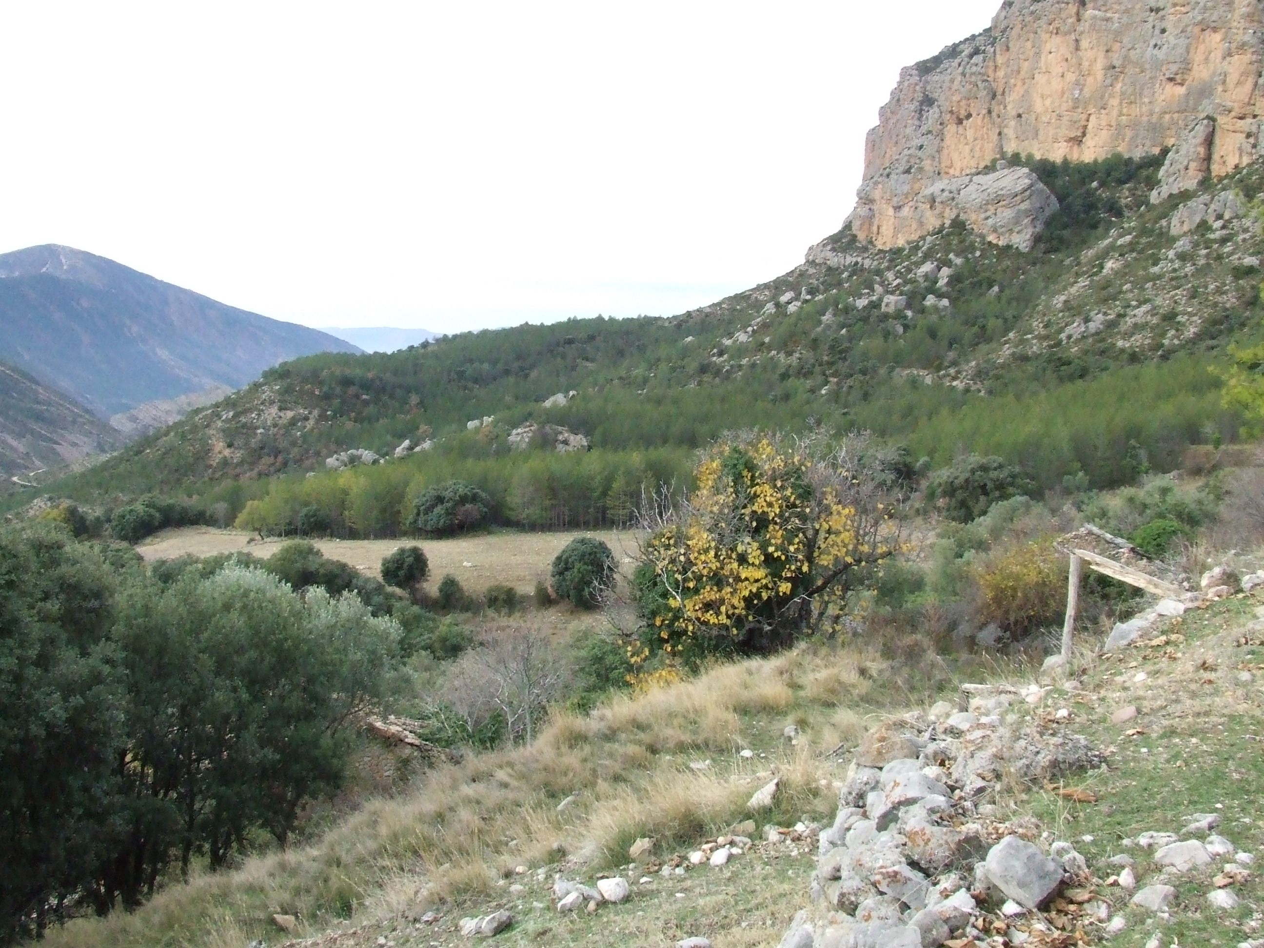 La Coma de Planers, a ponent d'Herba-savina (Hortoneda de la Conca, Conca de Dalt, Pallars Jussà)